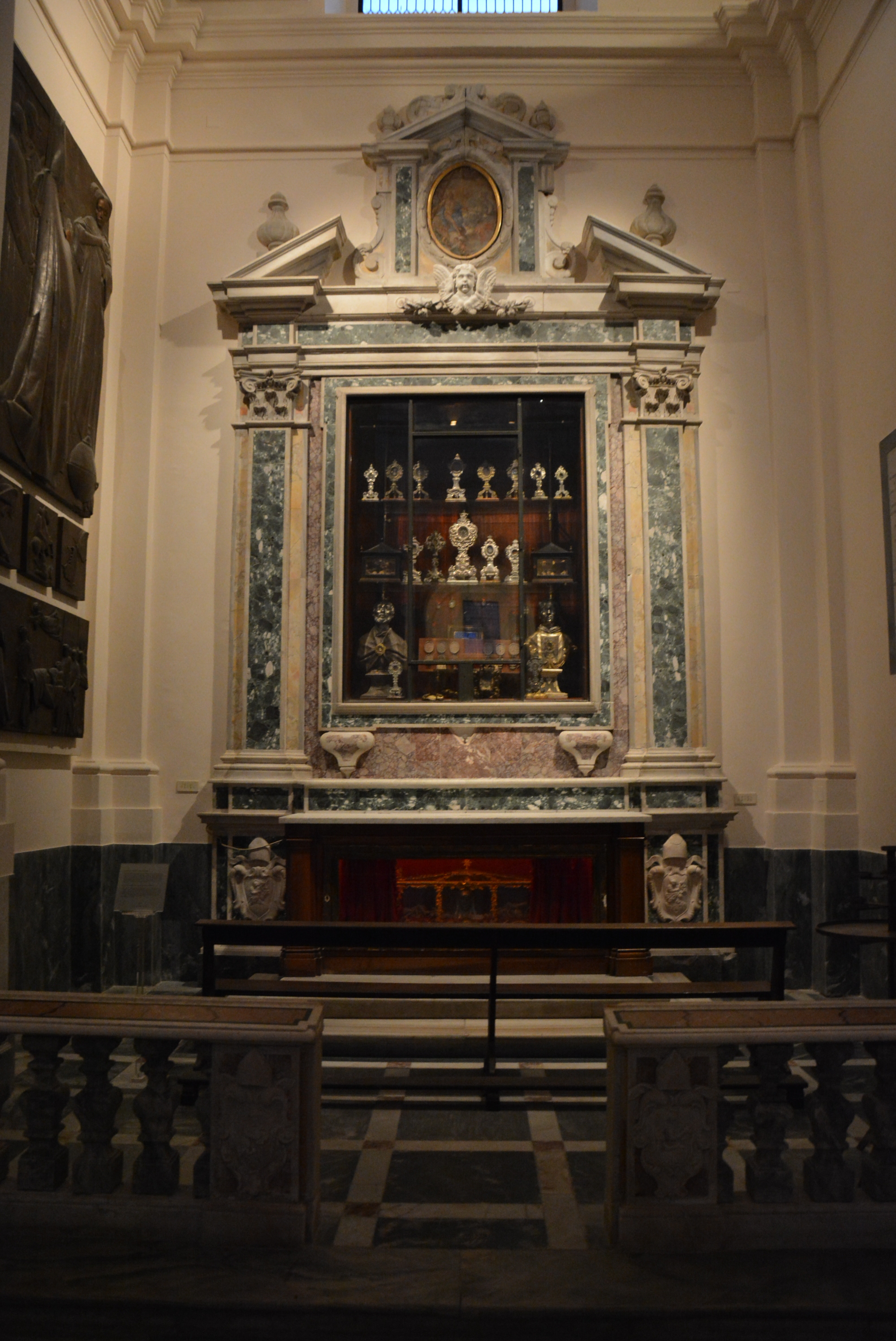 La cattedrale di Salerno